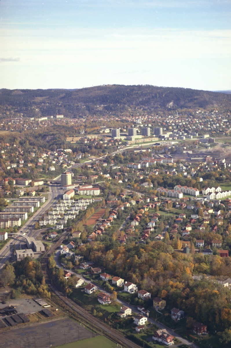 Bergslia og trikkesporet til Sognsvannsbanen i front. Ringveien til venstre. Tåsen og Nydalen i bakgrunnen.